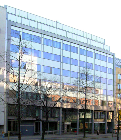 Utdanningsforbundets hovedkontor i Hausmans gate i Oslo.